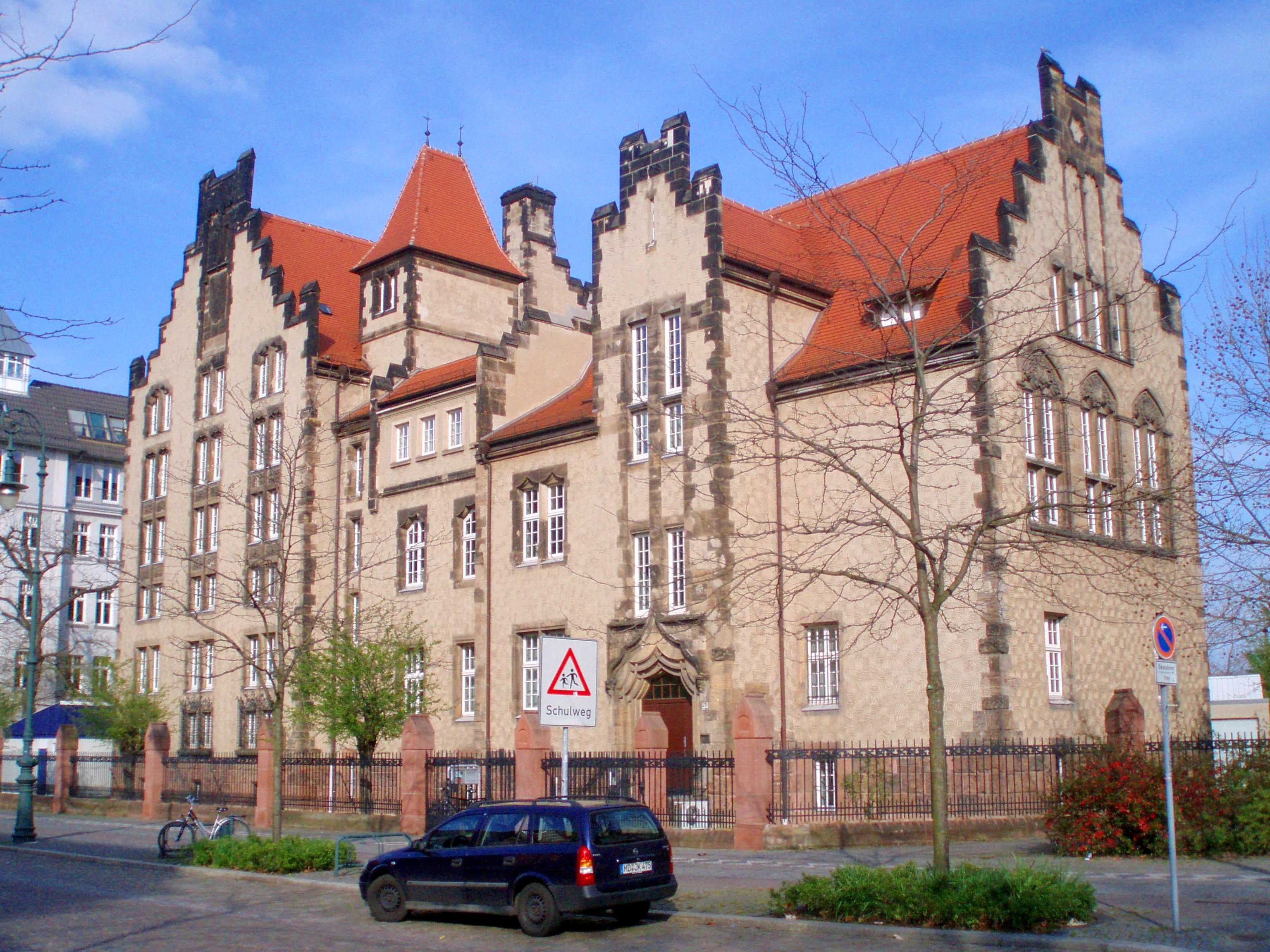 Landeshauptarchiv Sachsen-Anhalt, Abteilung Magdeburg